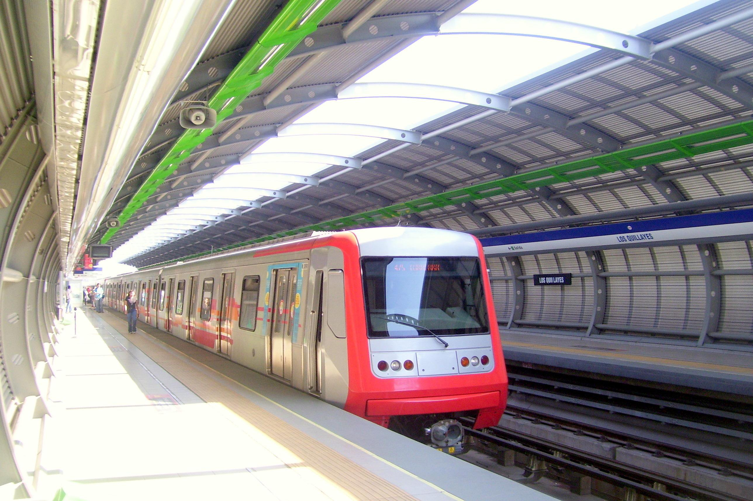 Estación Los Quillayes de Línea 4, Metro de Santiago (Chile)